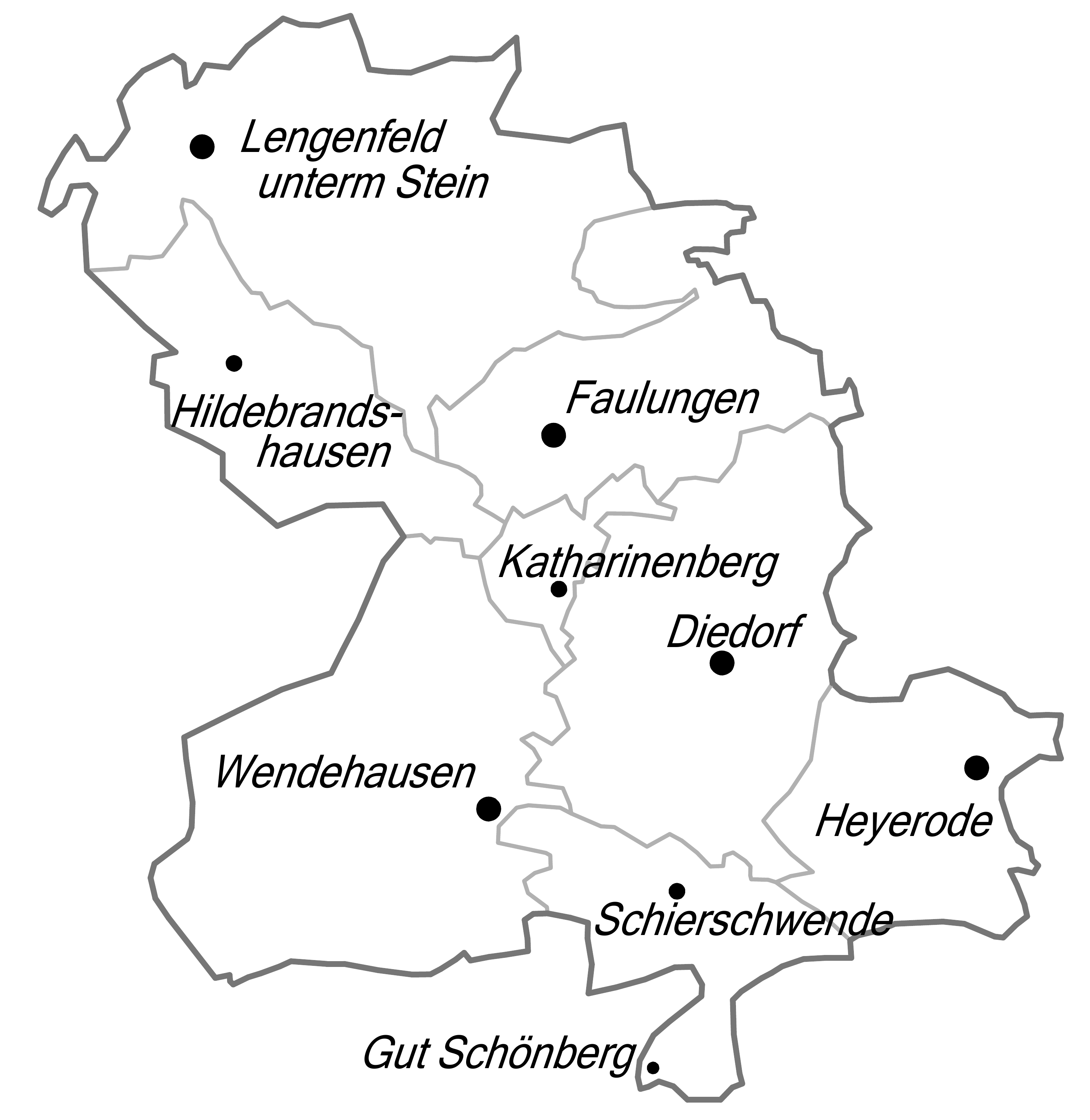 Gemeindegliederung von Südeichsfeld im Unstrut-Hainich-Kreis.